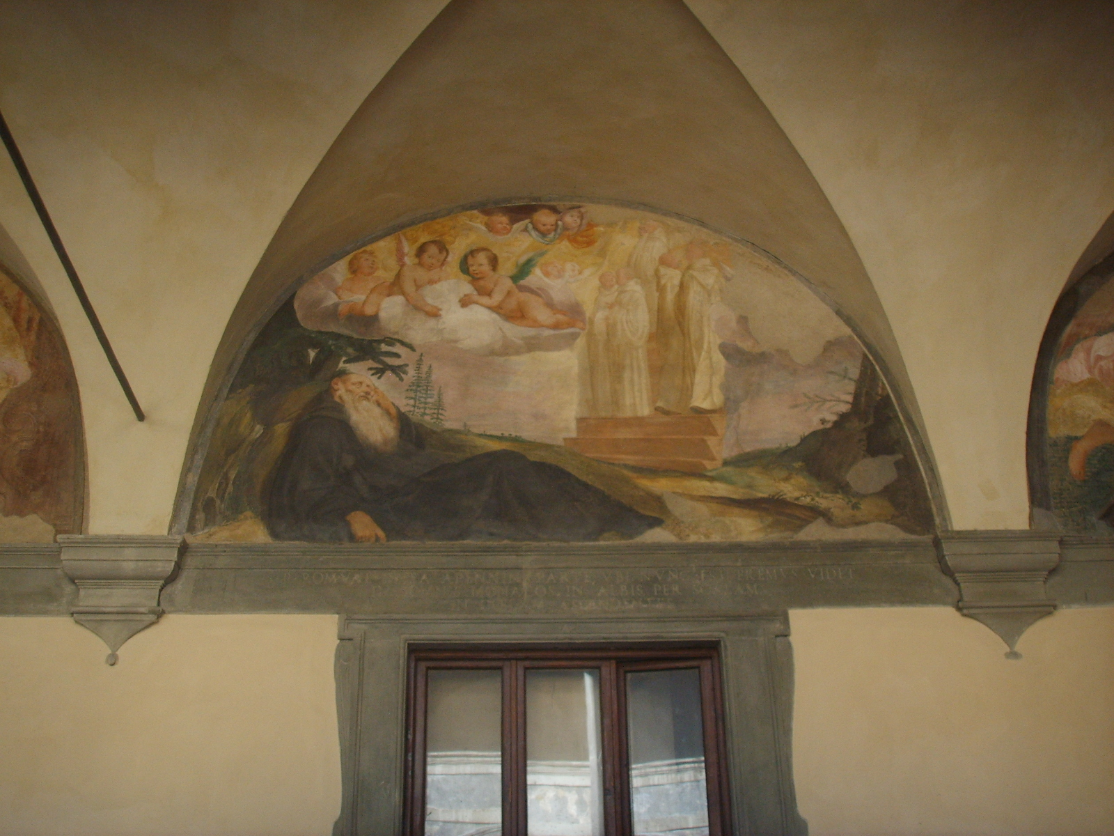 Santa Maria degli Angeli (Florence) chiostro_della_sacrestia Lunettes and busts, see image tilte